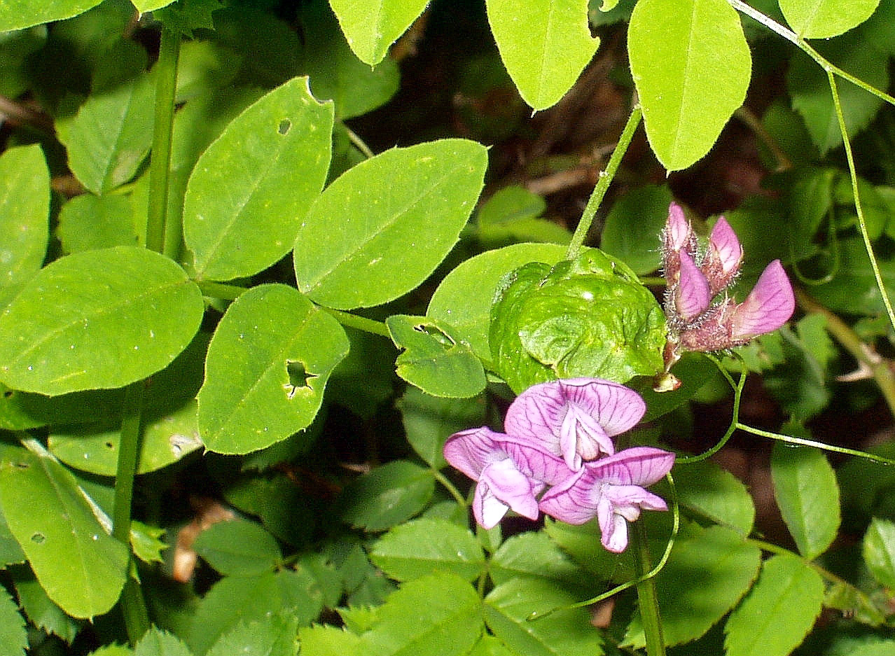 Plant species Vicia dumetorum, eigenes Foto